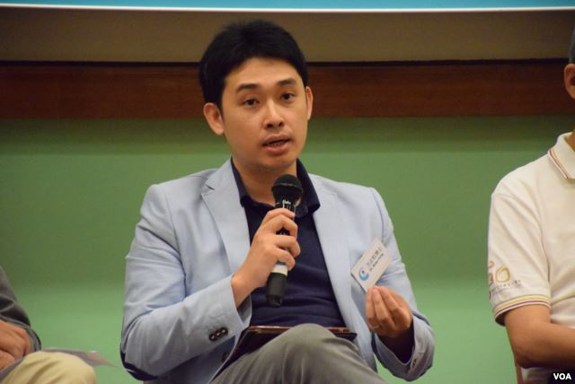 香港教育學院亞洲及政策研究學系助理教授方志恒。（美國之音湯惠芸攝）